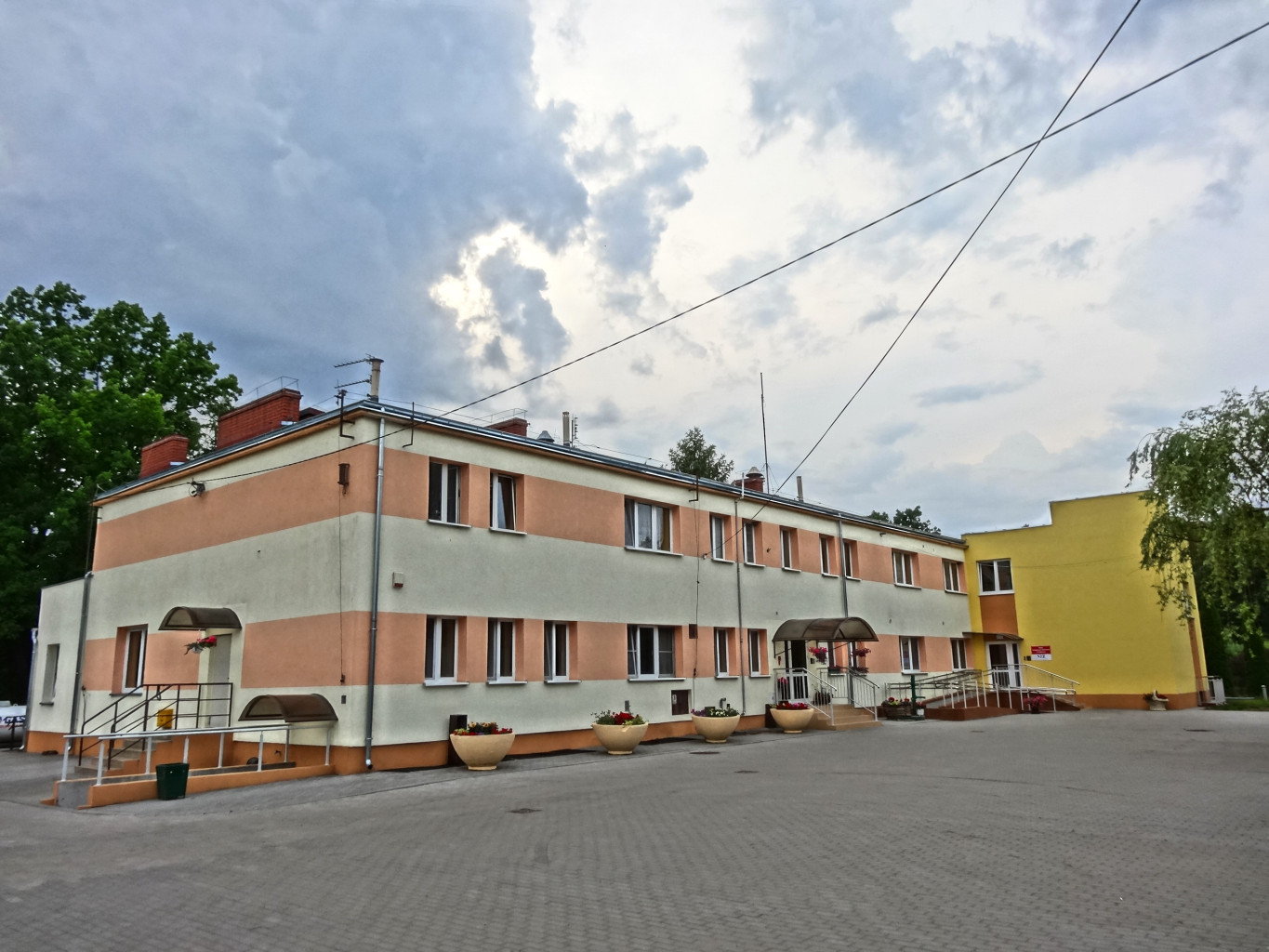 Smukała Dolna w Bydgoszczy